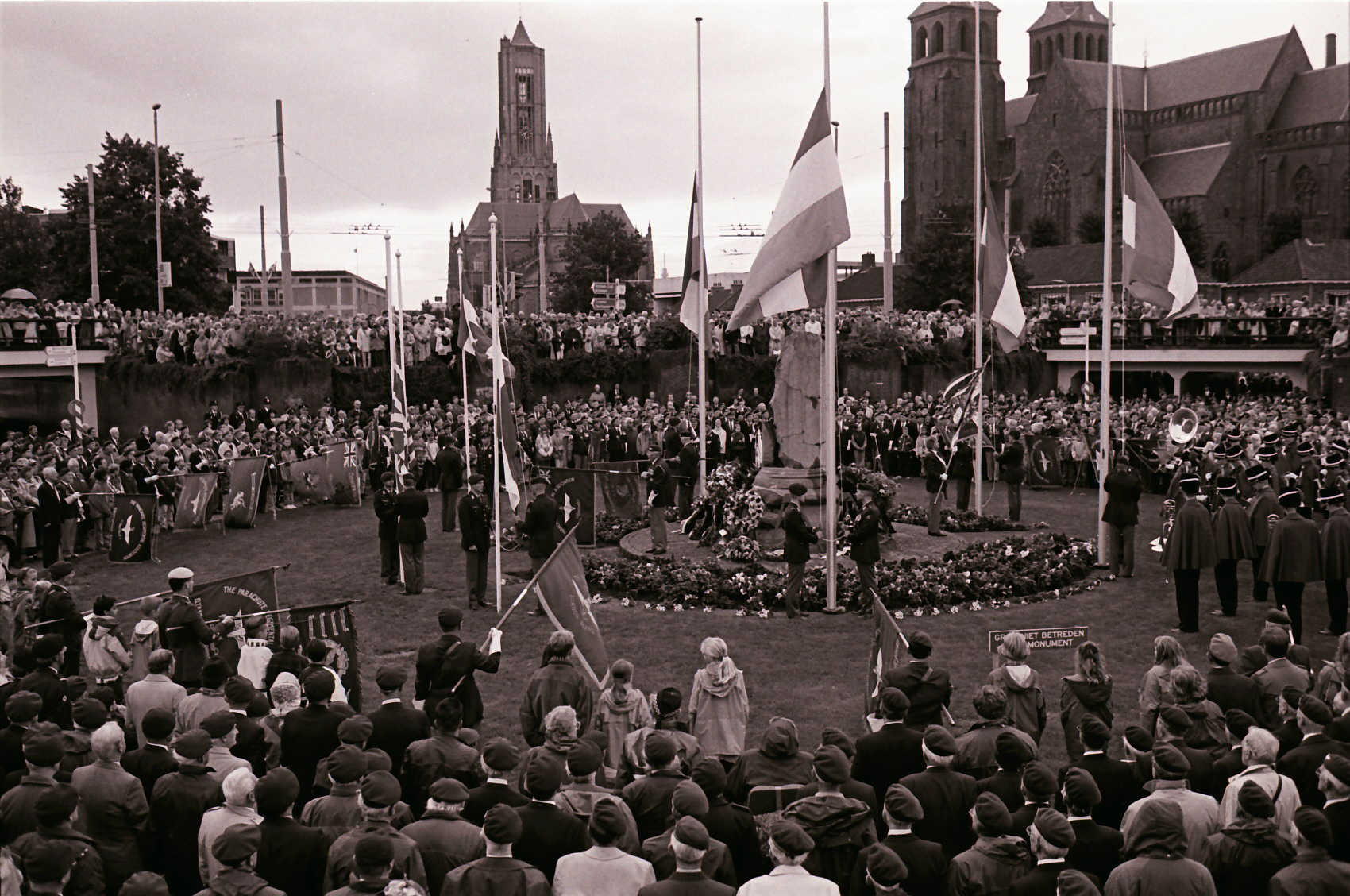 Airborne herdenking in de gemeente Arnhem De herdenking bij het oorlogsmonument op het Airborneplein in Arnhem.